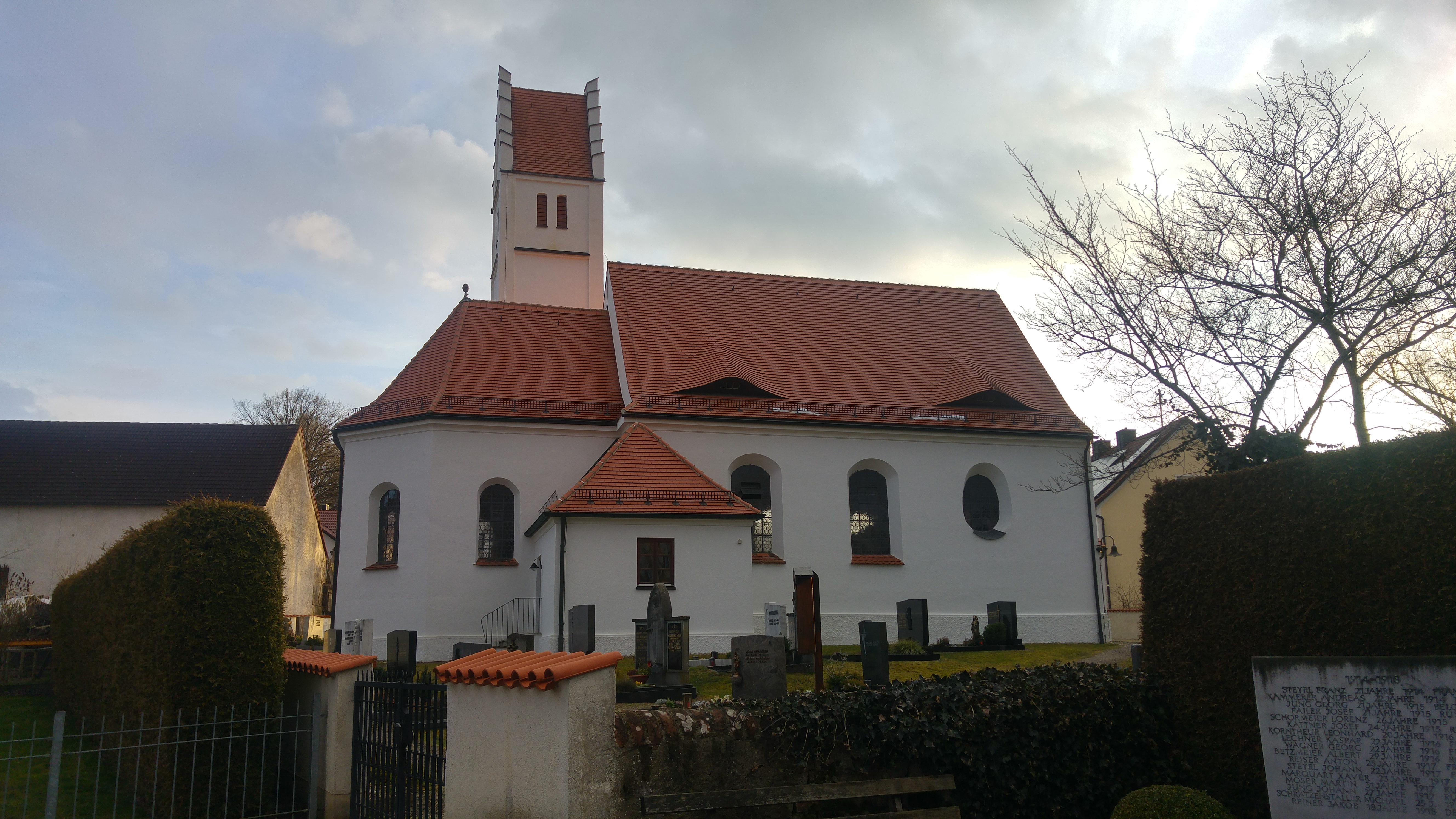 Baudenkmal Aktennr. D-7-71-113-79 Katholische Filialkirche St. Agatha, Chor spätmittelalterlich, Langhaus 1912, Turm 1935; mit Ausstattung.